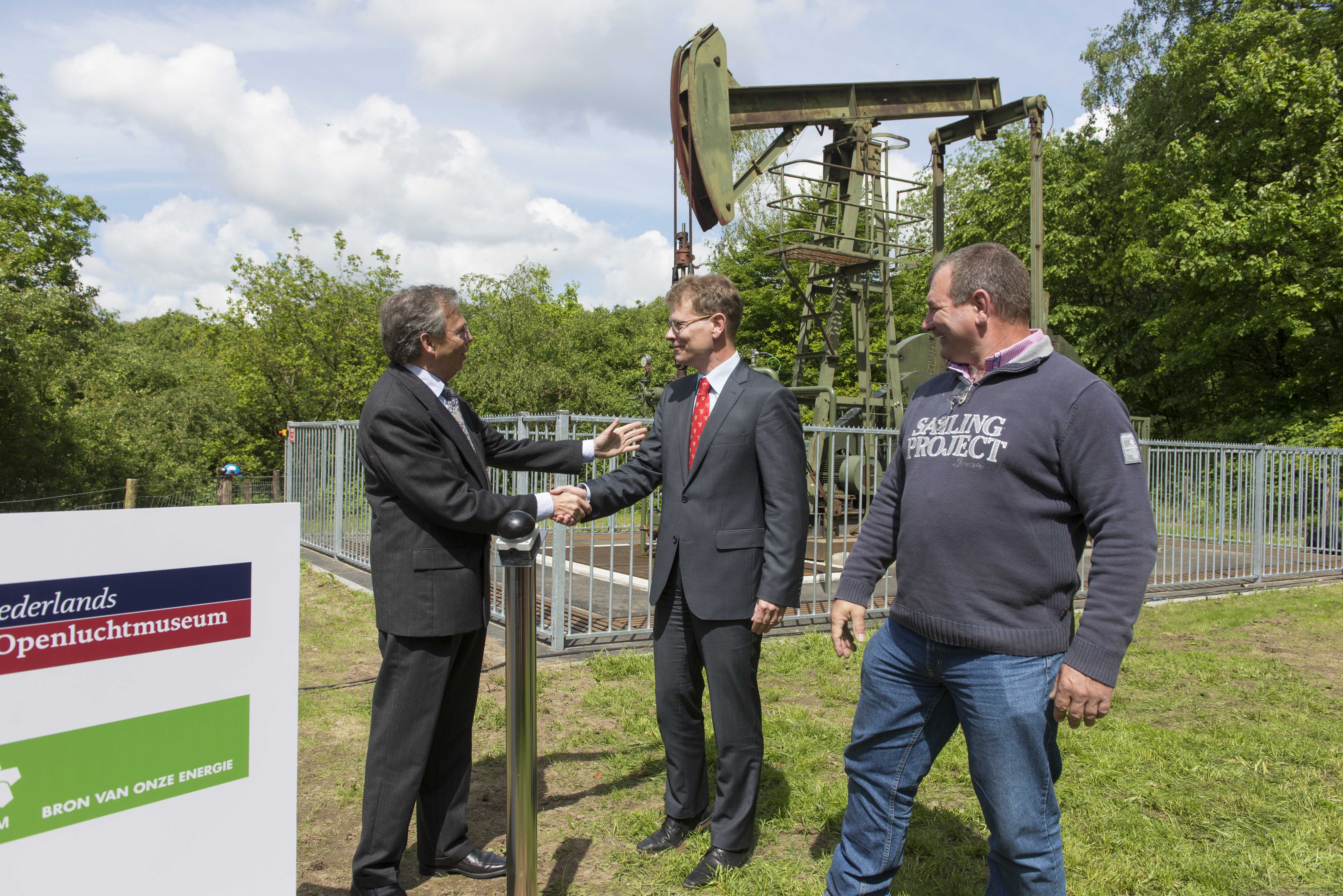 Feestelijk moment. Naamsvermelding - foto: Wim de Knegt - is verplicht